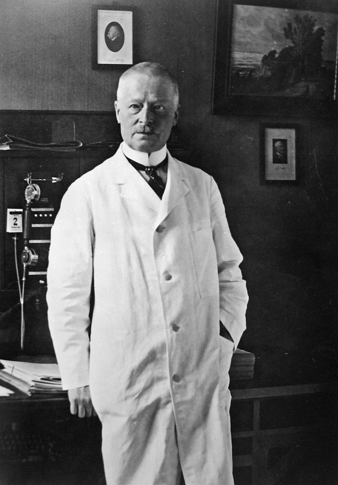 Dr. Hermann Simon in seinem Arbeitszimmer in Gütersloh